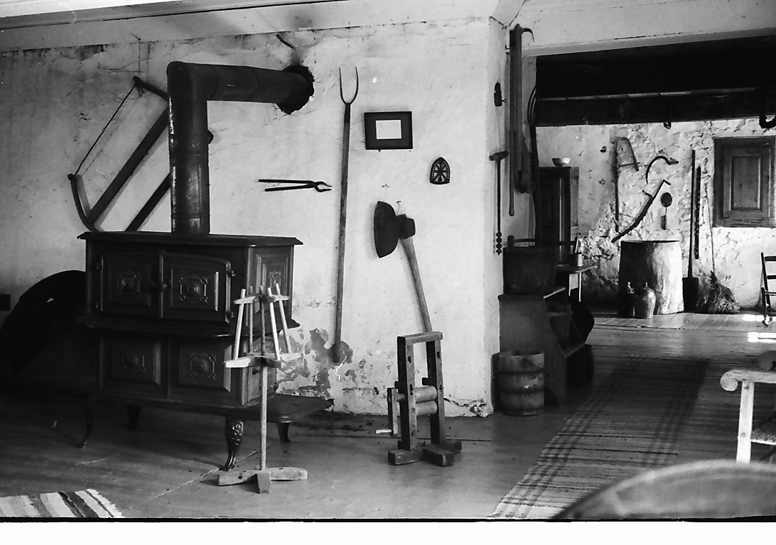 La Brimbale été 1962. Création d'un petit musée des arts et métiers traditionnels réservé à la clientèle de l'Âtre. Sainte-Famille (Canada). Photo Jean Antoine Demers. (Protection MH classé. Voir la liste des lieux patrimoniaux de la Capitale-Nationale pour plus de détails).